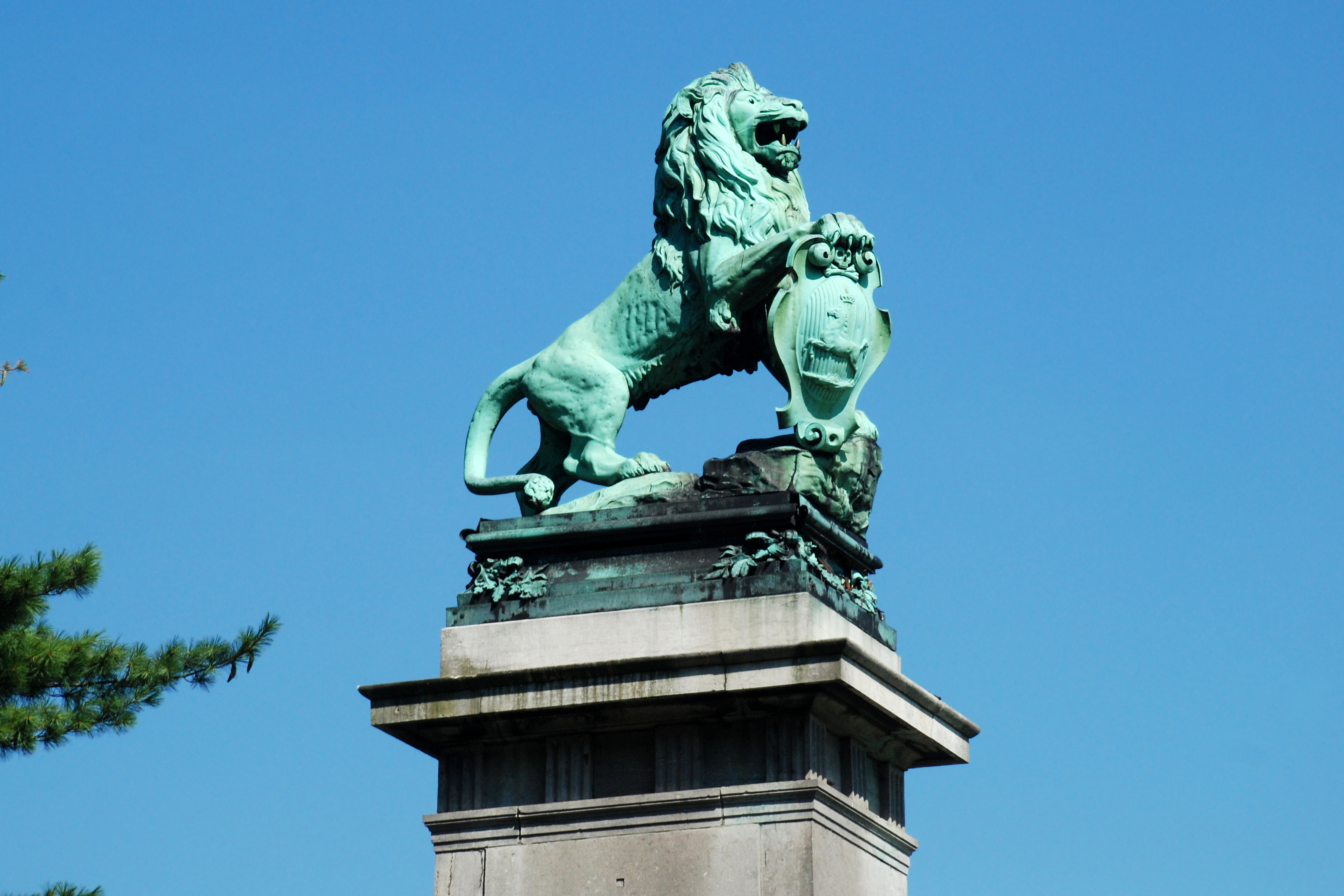 Belgique - Brabant wallon - Genappe - Monument Brunswick